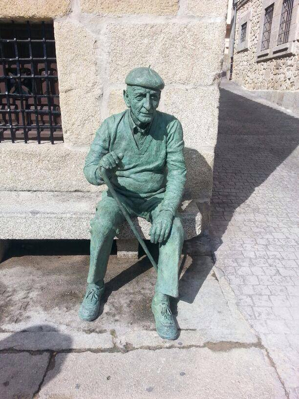 Monumento a la tercera edad situado en la Plaza del Ayuntamiento.